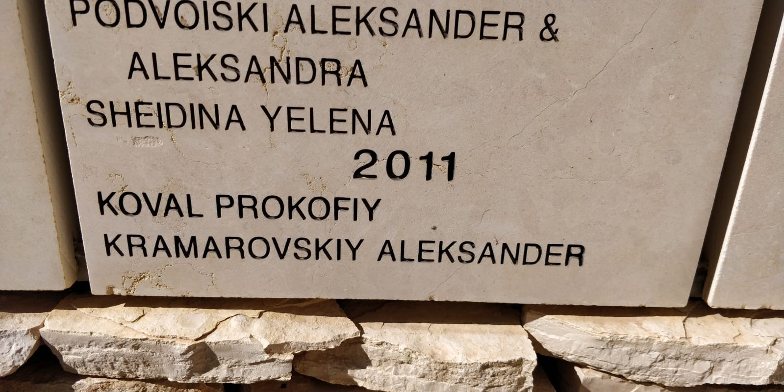 שמו של פרוקופי קובאל מונצח על קיר הכבוד לחסידי אומות העולם בגן חסידי אומות העולם ביד ושם